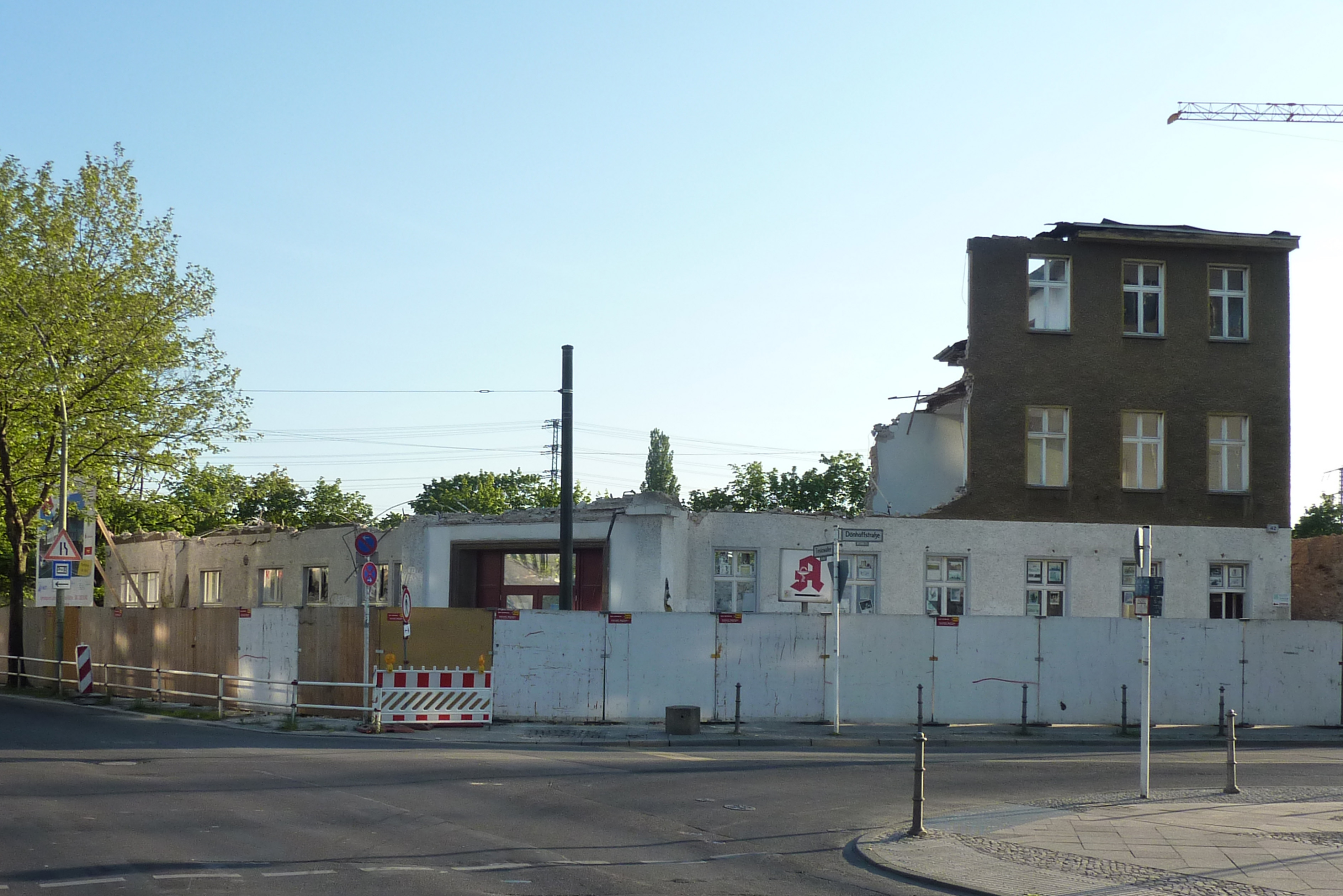 Abriss des Kulturhauses Karlshorst.